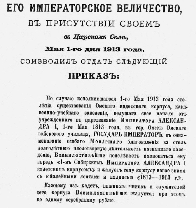 Высочайший приказ 1 мая 1913 - страница 1 (фрагмент): о переименовании Омского кадетского корпуса в 1-й Сибирский Императора Александра I кадетский корпус.(ретушь)